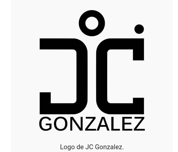 Logo